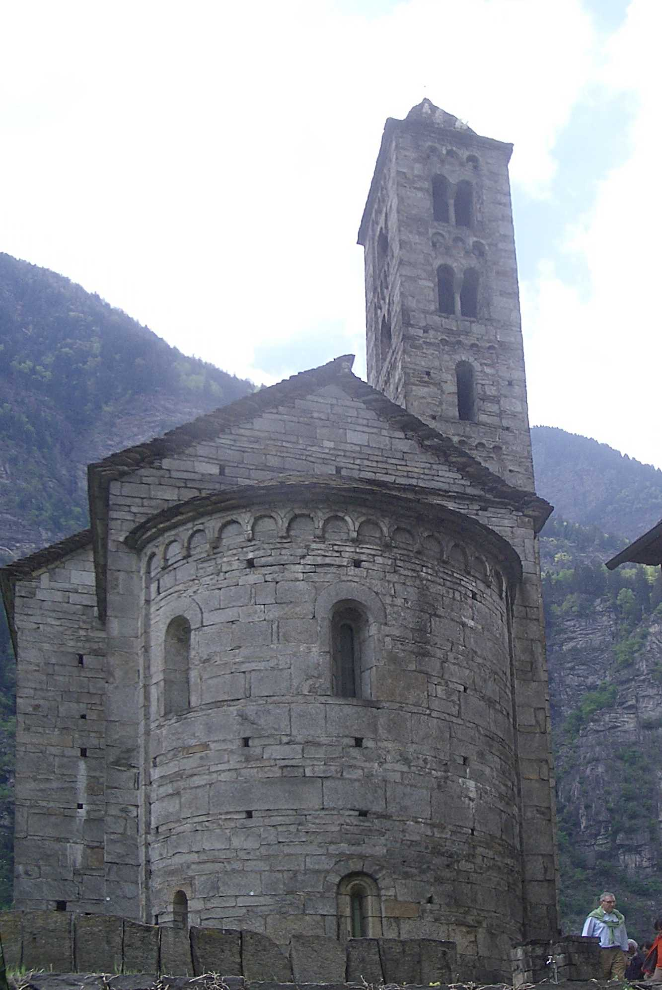 Giornico, St. Nicolao church”, apse, XIII century